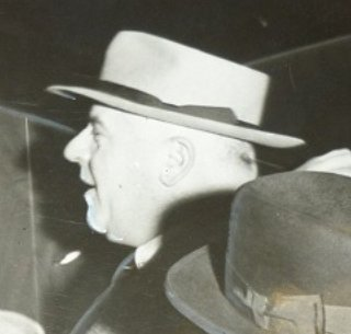 Oscar Nicolini, ministro de Comunicaciones de Argentina, 1948.